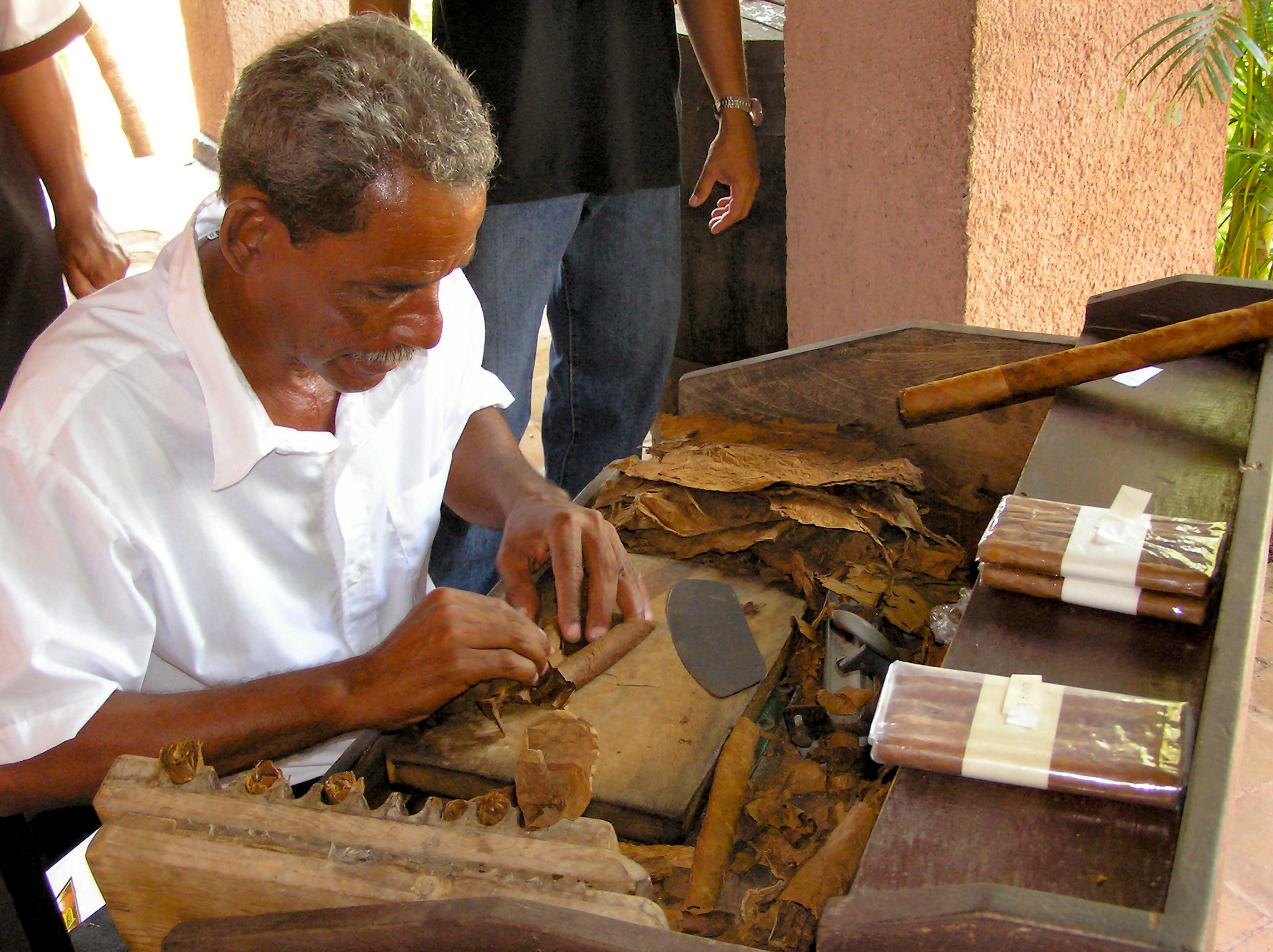 Santiago de Cuba - Les gens - Artisan cigarier